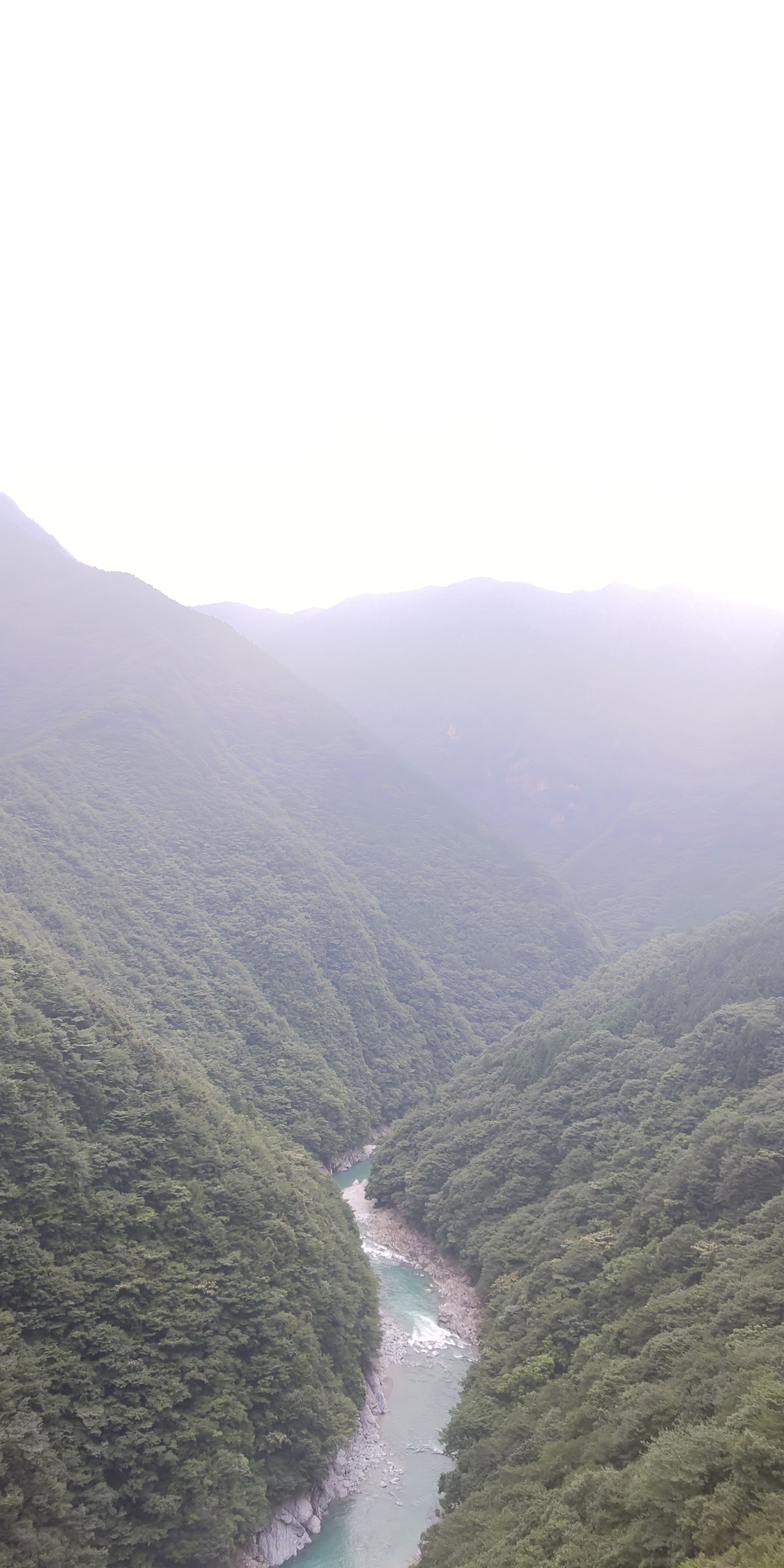 祖谷渓 ひの字渓谷